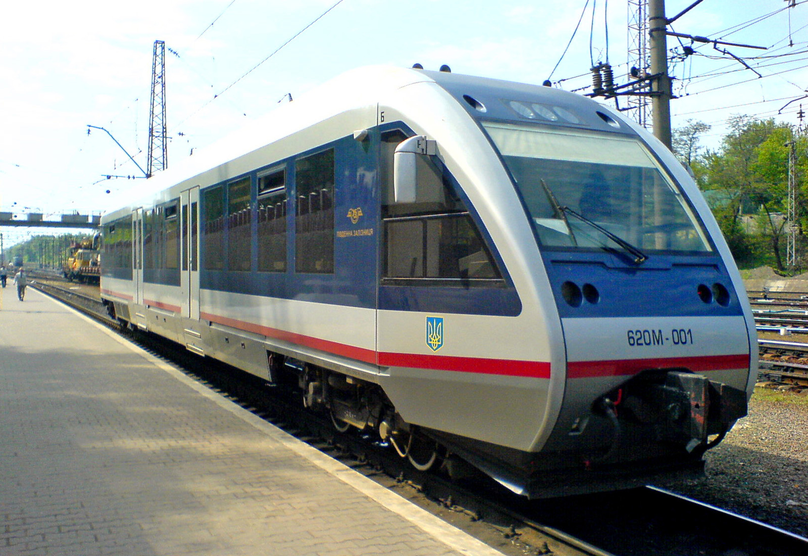 Чудо-поезд ЮЖД 1-А